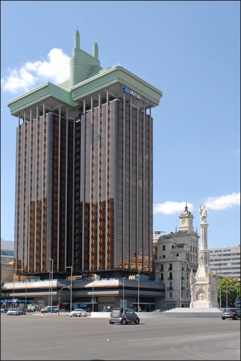 La Torre Colon (tour Colomb) est haute de 116 m et comprend 23 étages. Le bâtiment est en réalité composé de deux tours indépendantes mais reliées entre elles. Elle a été conçue en 1976 par l'architecte Antonio Lamela Martinez. Elle est située Plaza de Colon, un grand carrefour, au centre duquel se trouve une colonne blanche surmontée de la statue de Christophe Colomb et érigée en 1885.